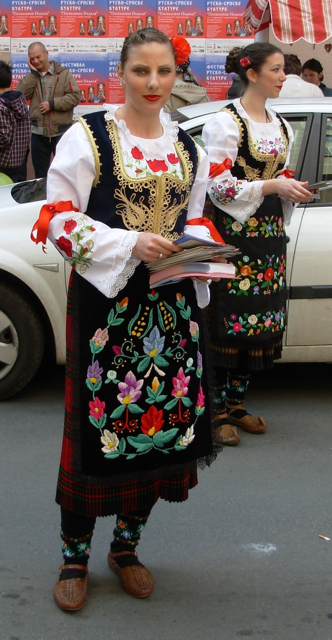 Srpska narodna nošnja. Slikao Goldfinger